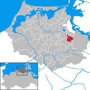 Elmenhorst in Mecklenburg-Vorpommern - District Nordvorpommern